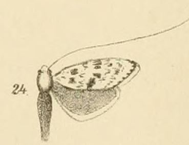 Ceromitia turpisella